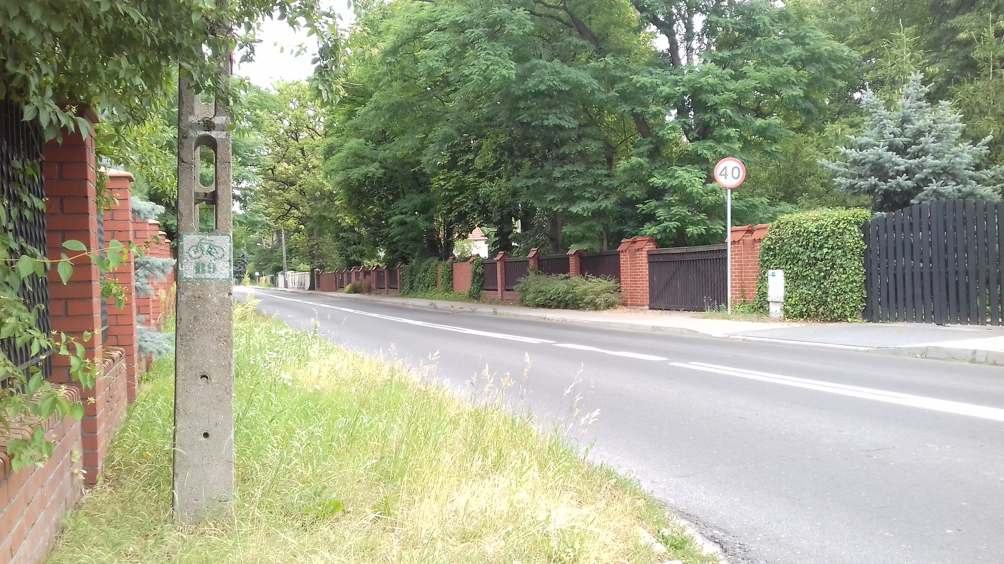 Oznaczenie szlaku pieszego im. Fiedlera na skrzyżowaniu ul. Fiedlera i Ratajskiego w Puszczykówku